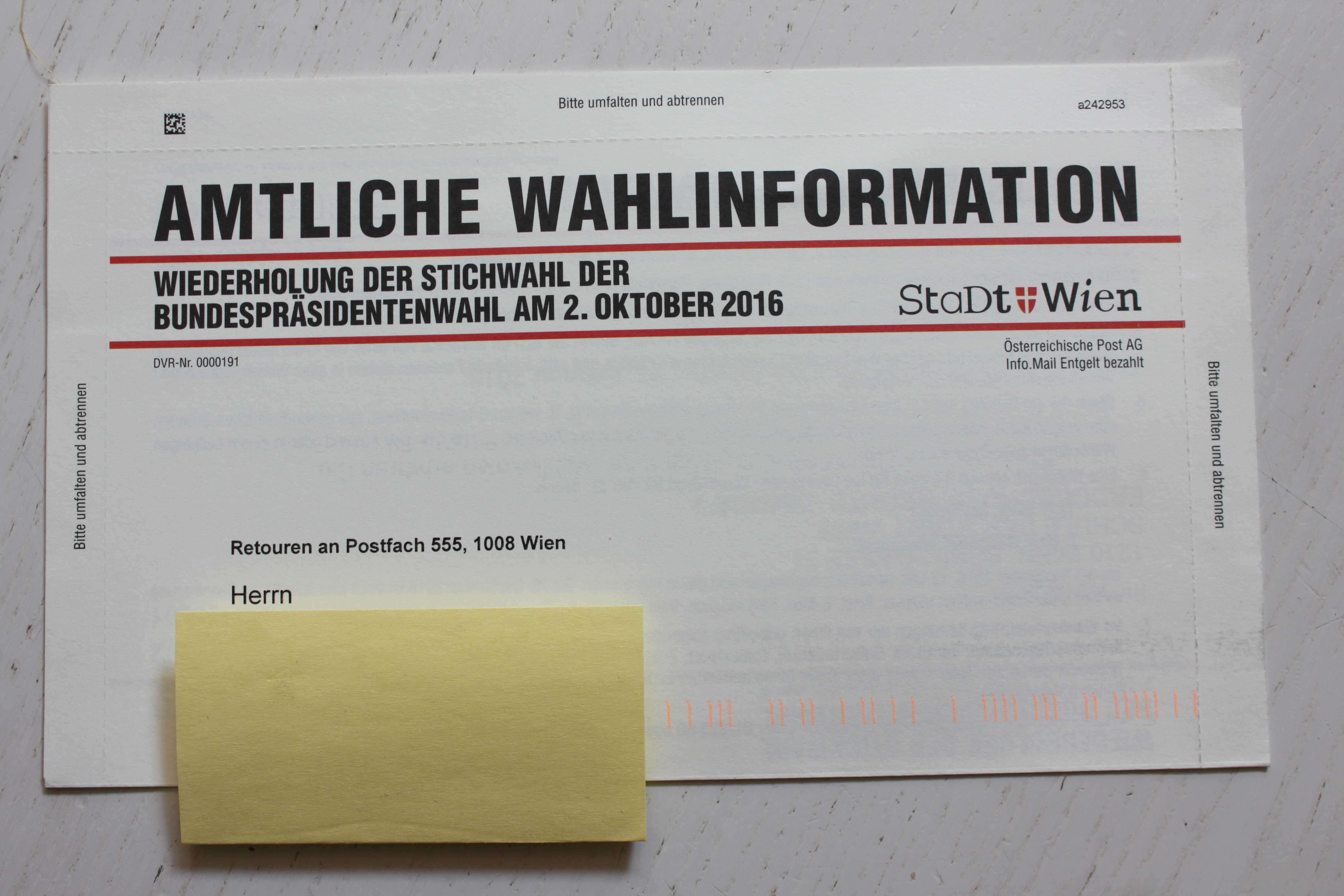 Amtliche Wahlinformation der Gemeinde Wien zur Wiederholung der Stichwahl der Bundespräsidentenwahl am 2. Oktober 2016, per Post am 12. September 2016 zugestellt, per Nachrichten in den Medien am 12. September 2016 bereits wieder verschoben